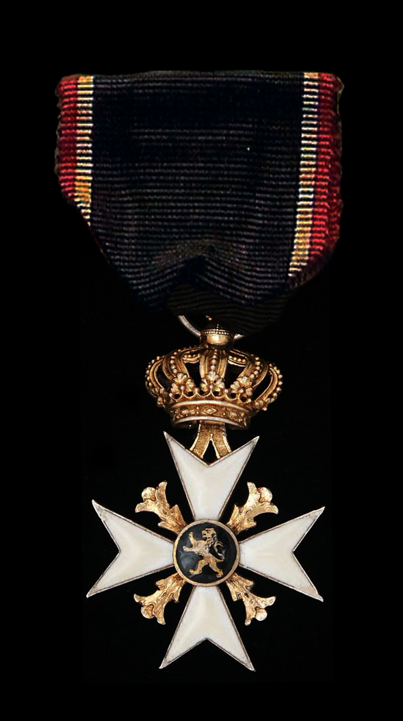 Croix Commémorative des Volontaires de 1830